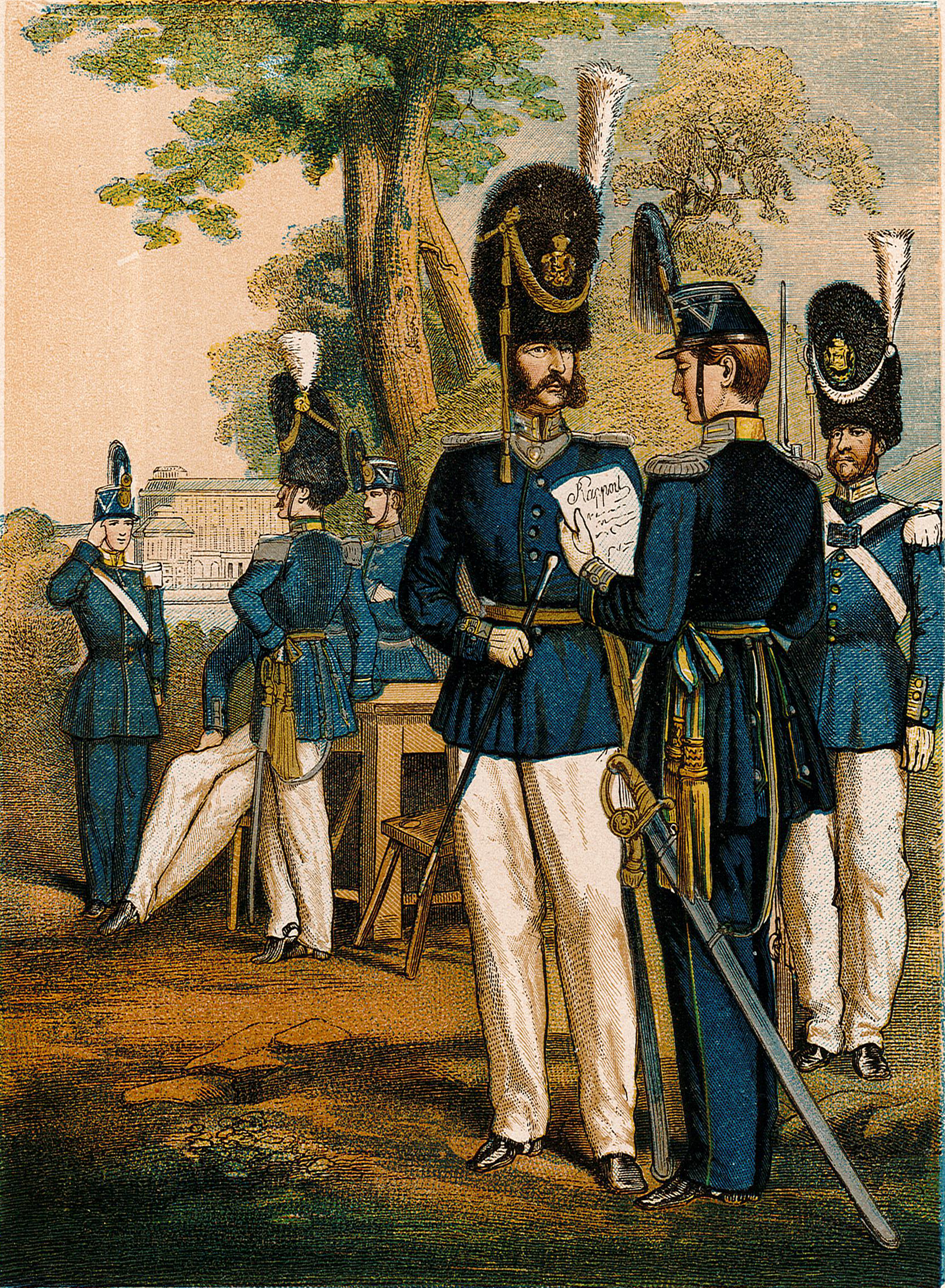 Uniformer för ”Konungens Svea Lif-Garde.”